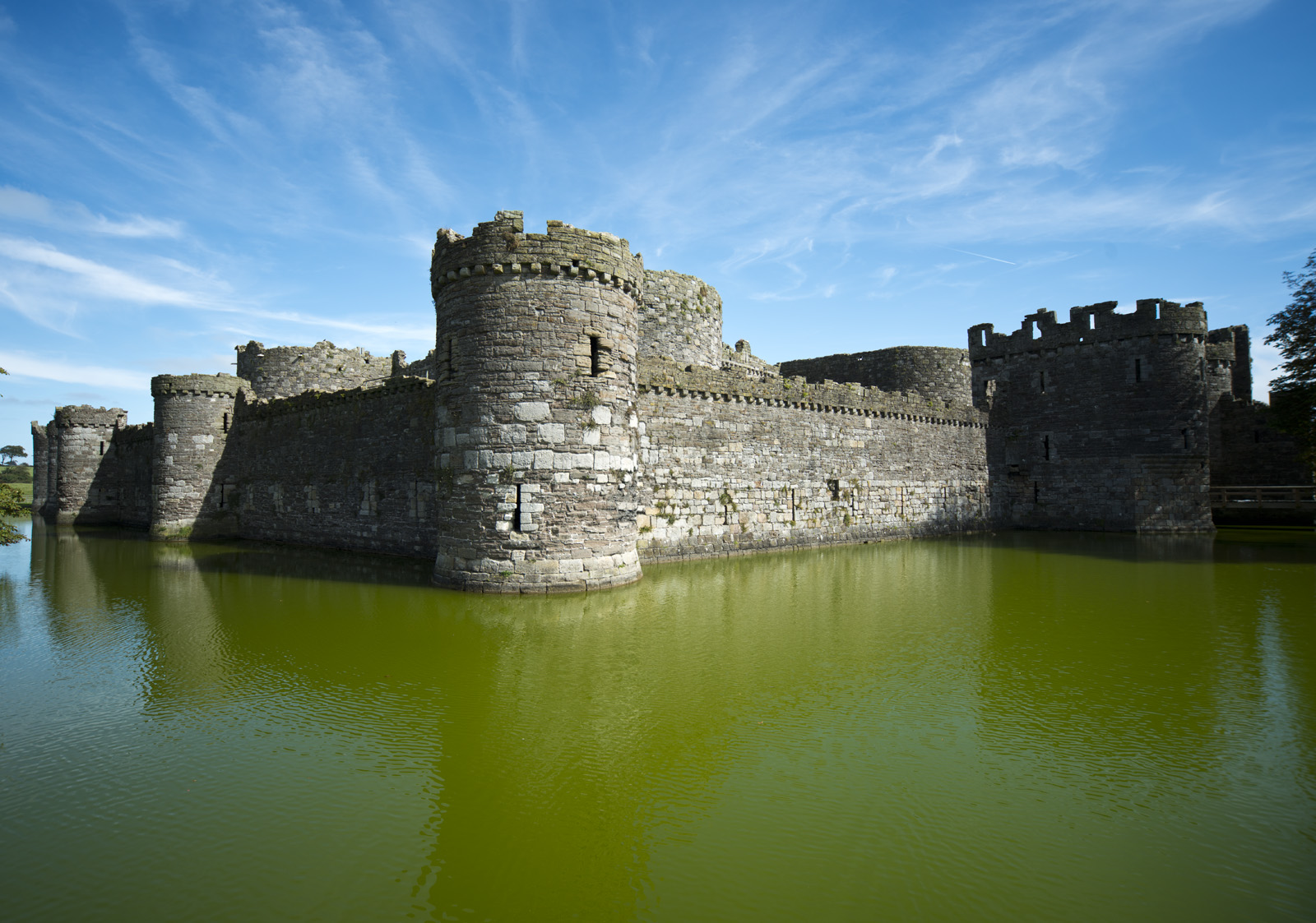 Beaumaris Castle